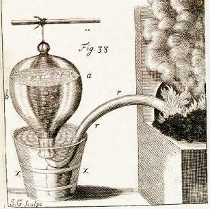 Appareil de Hales pour mesurer le volume de gaz dégagé par la "distillation"" dans la cornue r